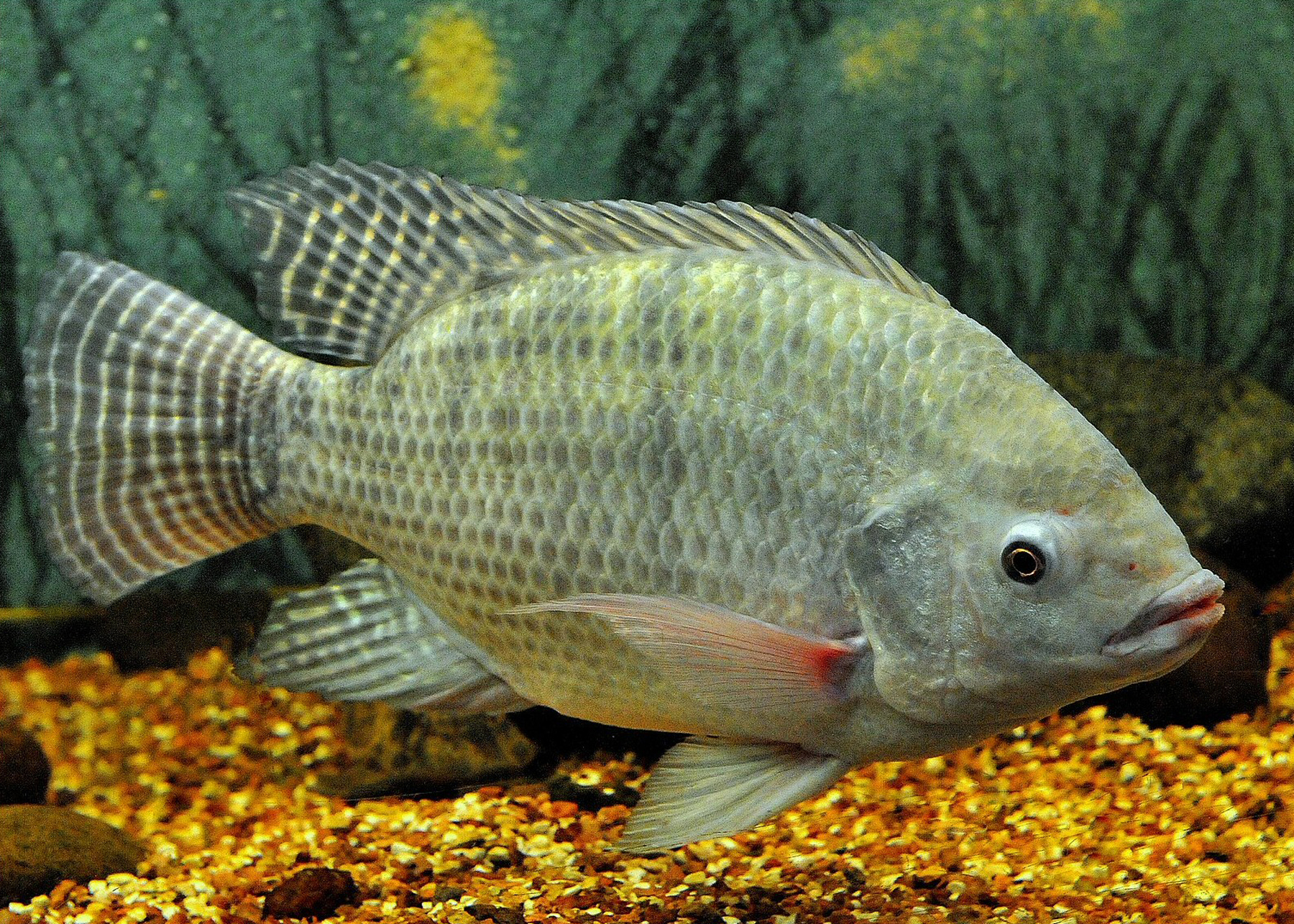 Ciclídeo originário do Rio Nilo